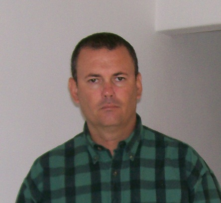 Fotografía del escritor cubano Pedro Luis Rodríguez Molina.